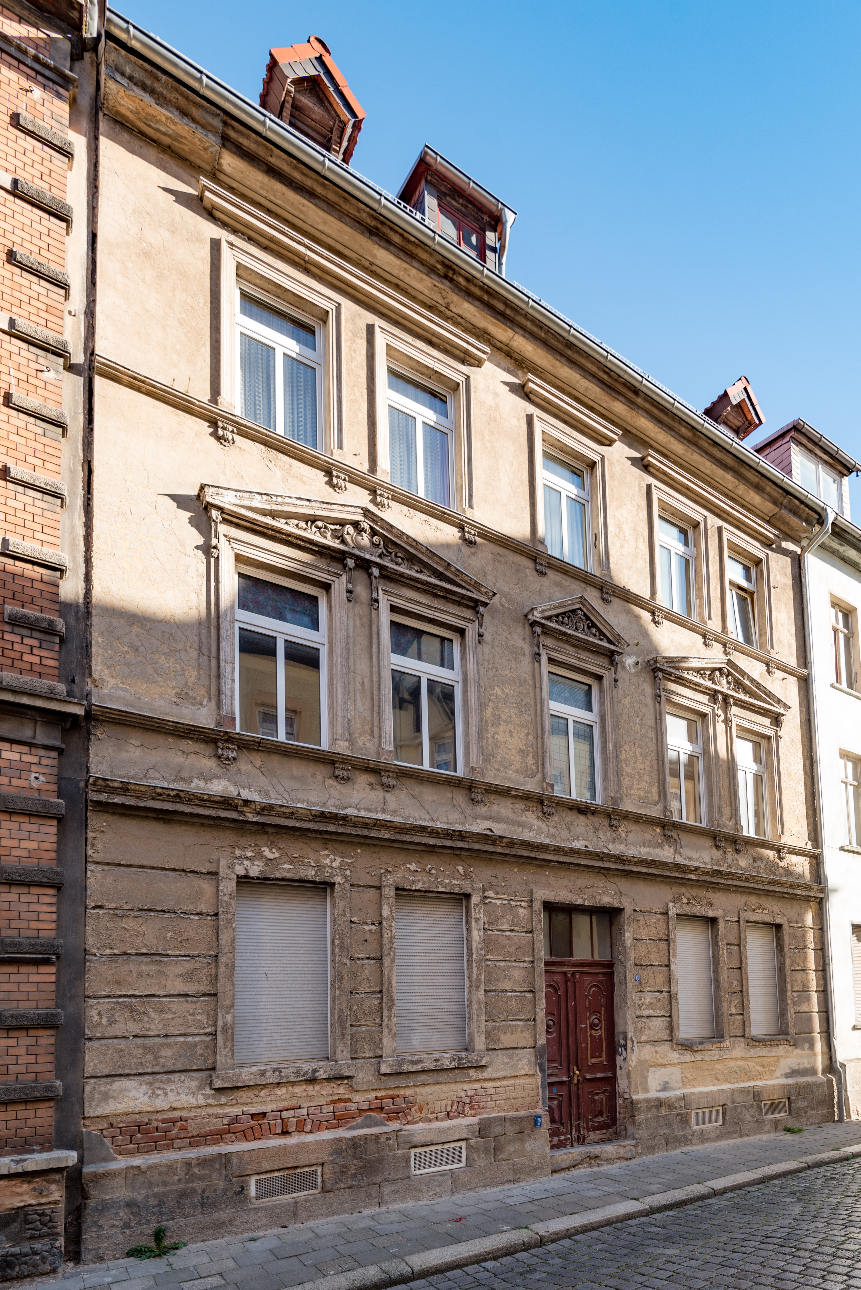 Weißenfels, Rudolf-Götze-Straße 6